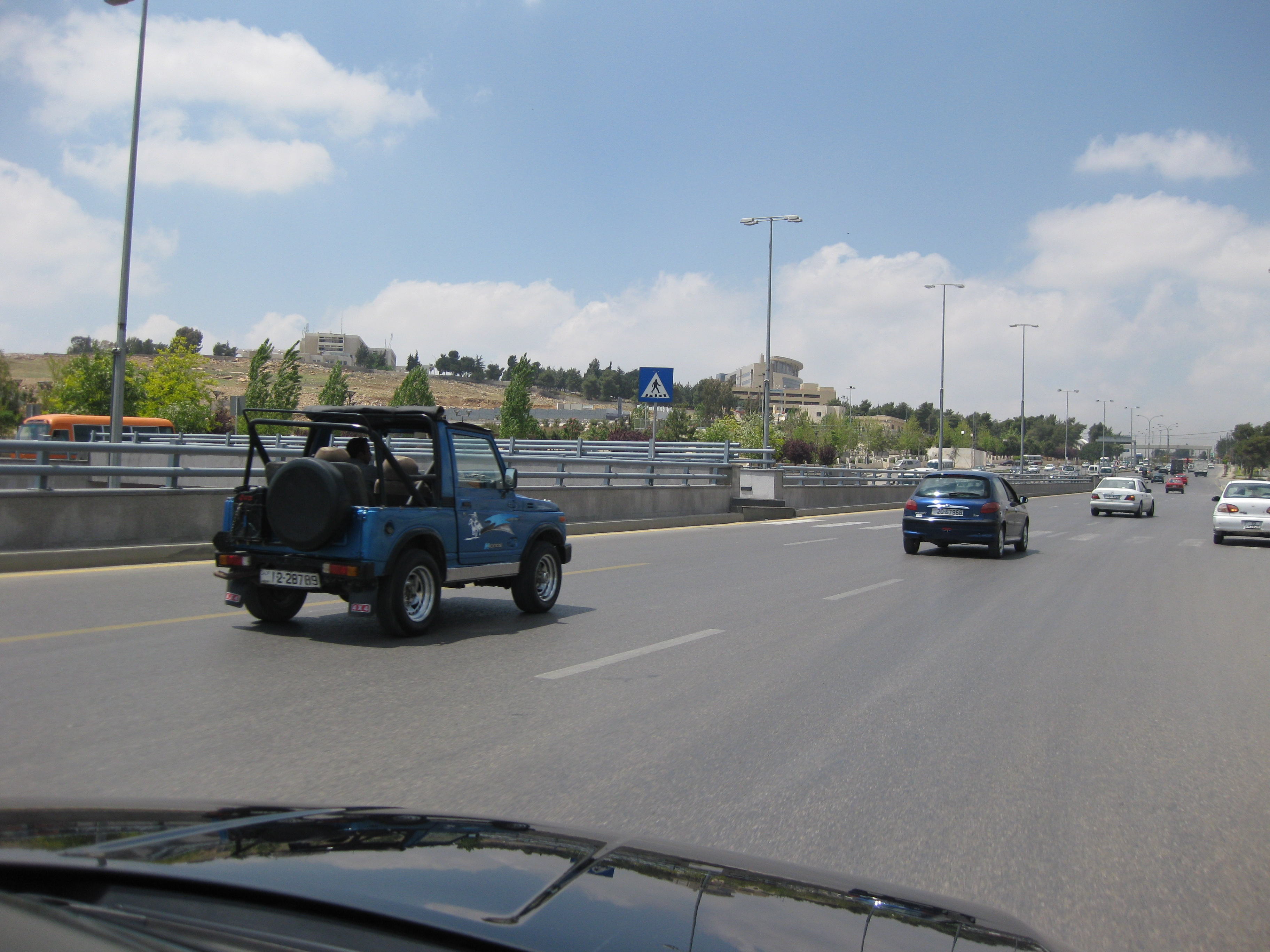 King Abdullah II Street - Amman